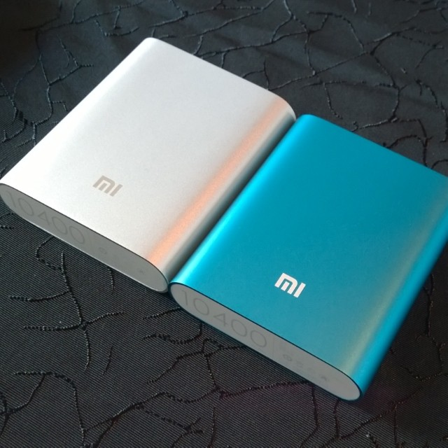 Présentation de la batterie externe Xiaomi (PowerBank) 10400 mAh, le 19 mai 2014 en Malaisie.